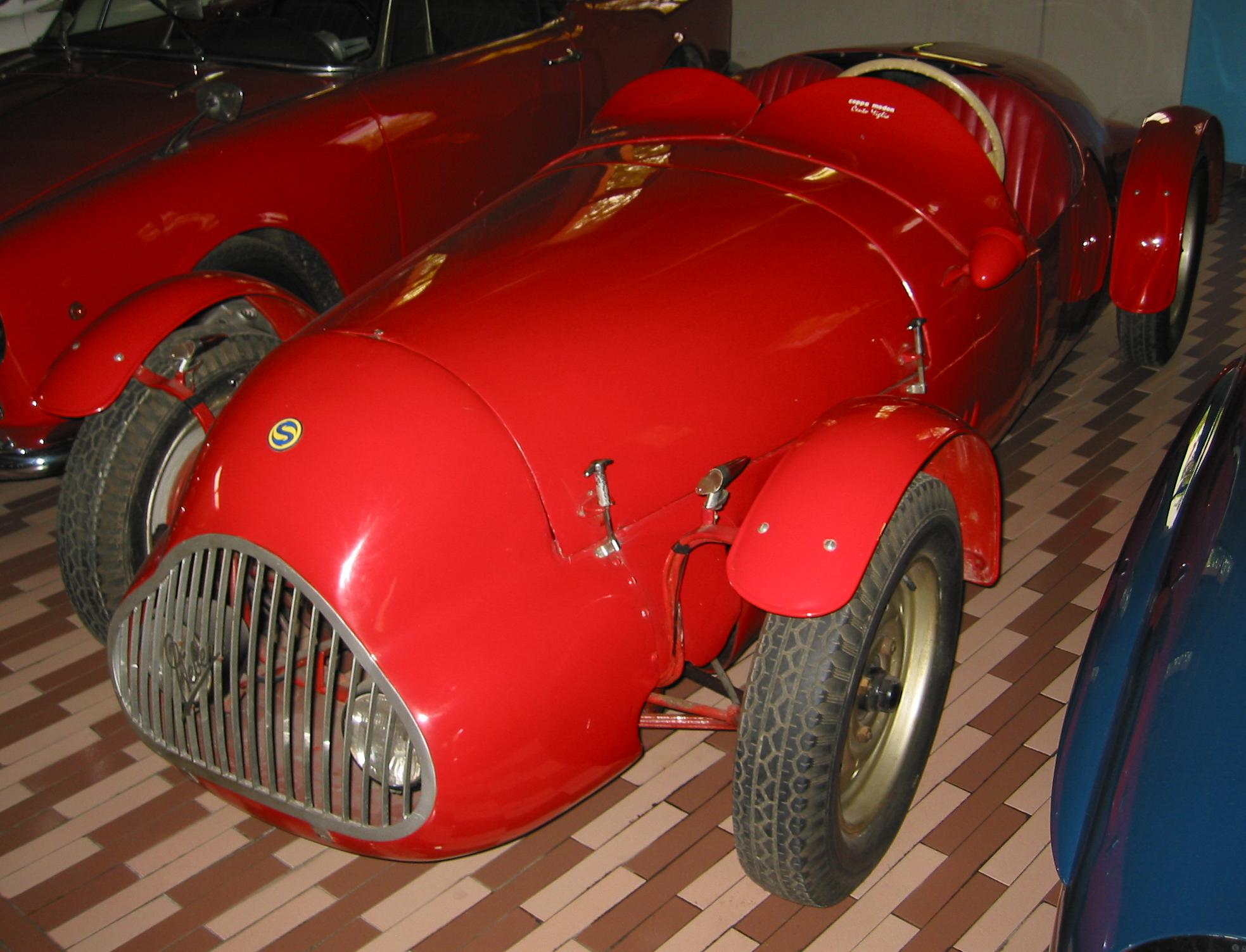 Stanguellini